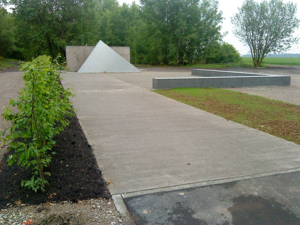 Mahnmal des KZ-Außenlagers Hailfingen-Tailfingen